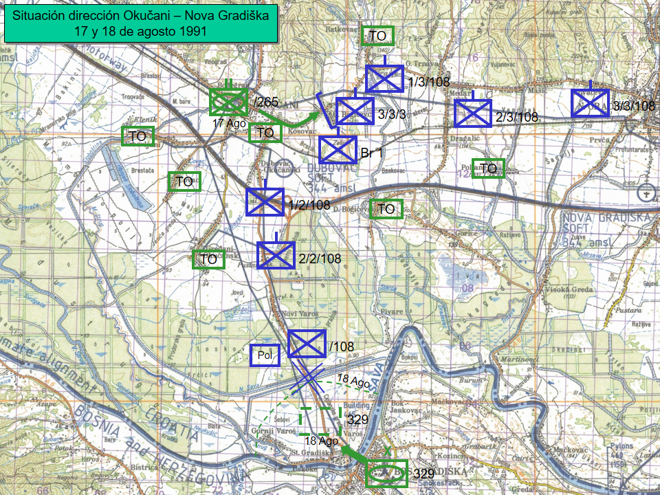 SItuación militar en los alrededores de Okučani el 17 y 18 de agosto de 1991. Fuerzas enfrentadas el JNA y ZNG